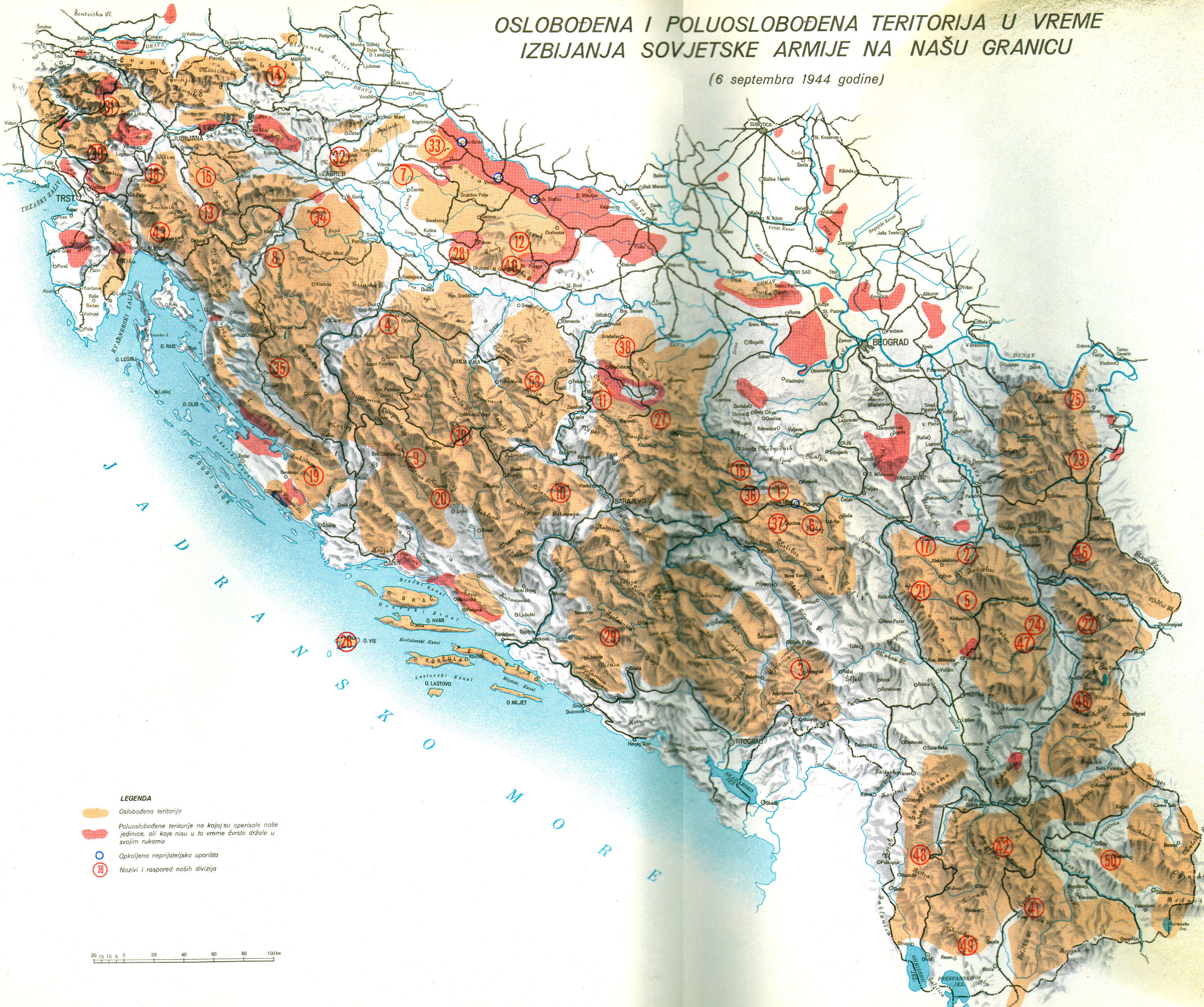 Srpskohrvatski / српскохрватски: Oslobođena i poluoslobođena teritorija u vreme izbijanja Sovjetske armije na jugoslovensku granicu (6 septembra 1944 godine)